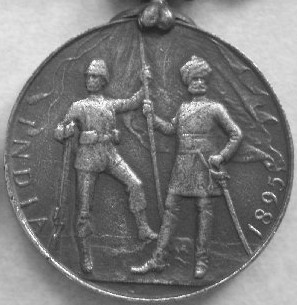 India Medal 1895 reverse